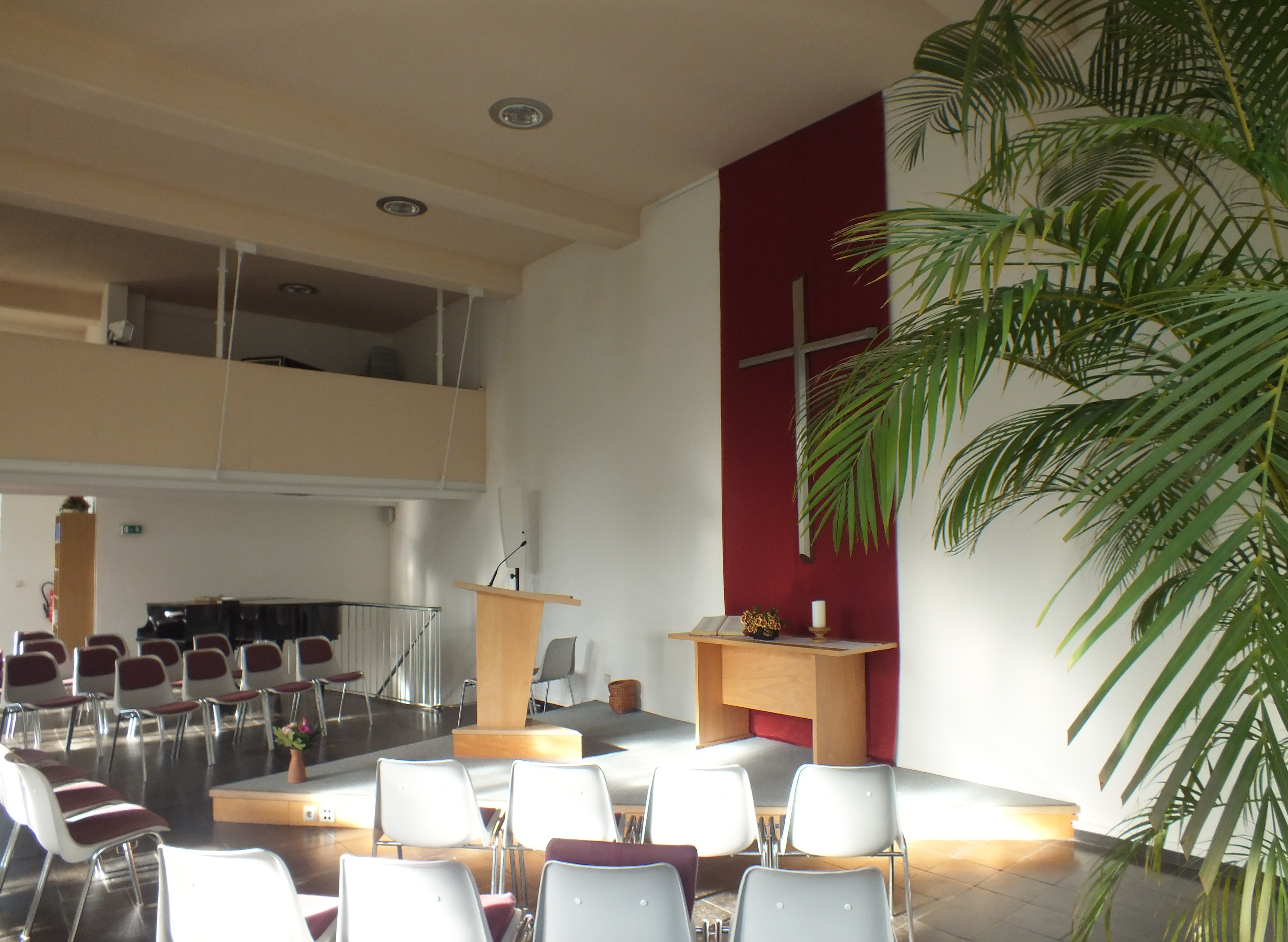 Straße in Berlin-Friedrichshagen: Klutstraße, Freikirchliche Gemeinde (Baptisten) "Friedenskirche"